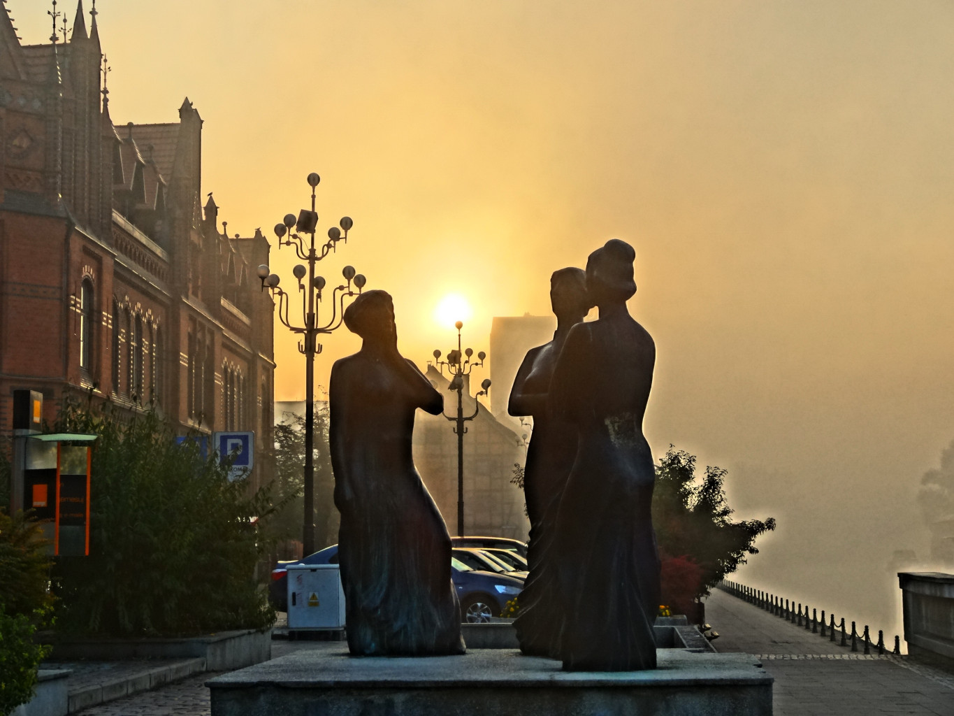 Rzeźba Trzy Gracje na bulwarze nad Brdą w Bydgoszczy